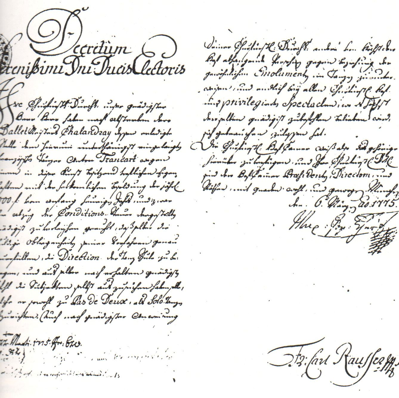 Anstellungsvertrag für Antoine Trancart in München als Ballettmeister, unterzeichnet vom Kurfürsten Max Joseph. Aus: Pia und Pino Mlakar, Unsterblicher Theatertanz, Band I, Florian Noetzel Verlag 1992, S. 101